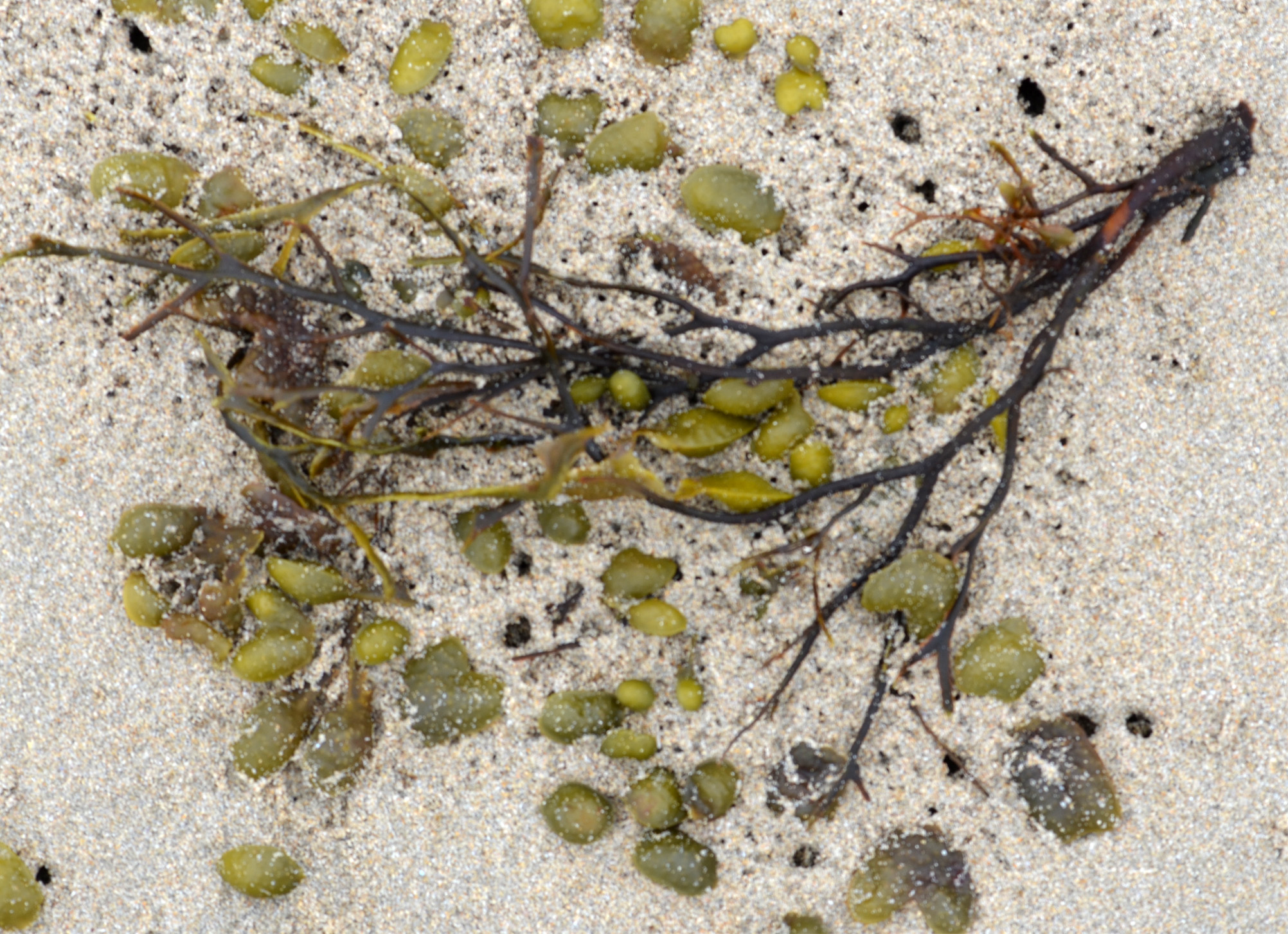 Algue (fucacée) déposée par la mer et en partie démantelée par des talitres (Talitrus saltator), Plage de la Palue, près du Cap de la Chèvre, sur la presqu'île de Crozon, dans le Finistère (Ouest de la France). Les talitres jouent un rôle important pour la décomposition des laisses de mer, la bioturbation, et l'aération des sables sédimentés